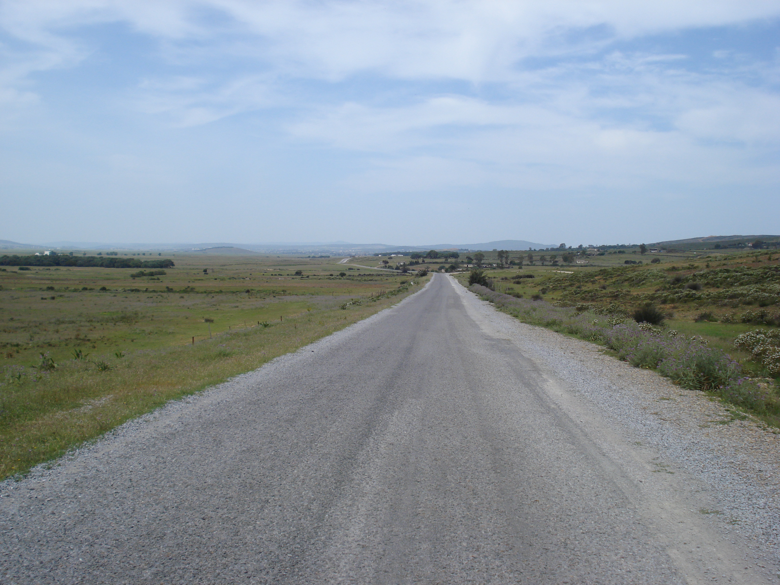 La Route Régionale n°58 près du village "Eddahra الدحرة", Délégation de Sejnane, Gouvernerat de Bizerte, Tunisie